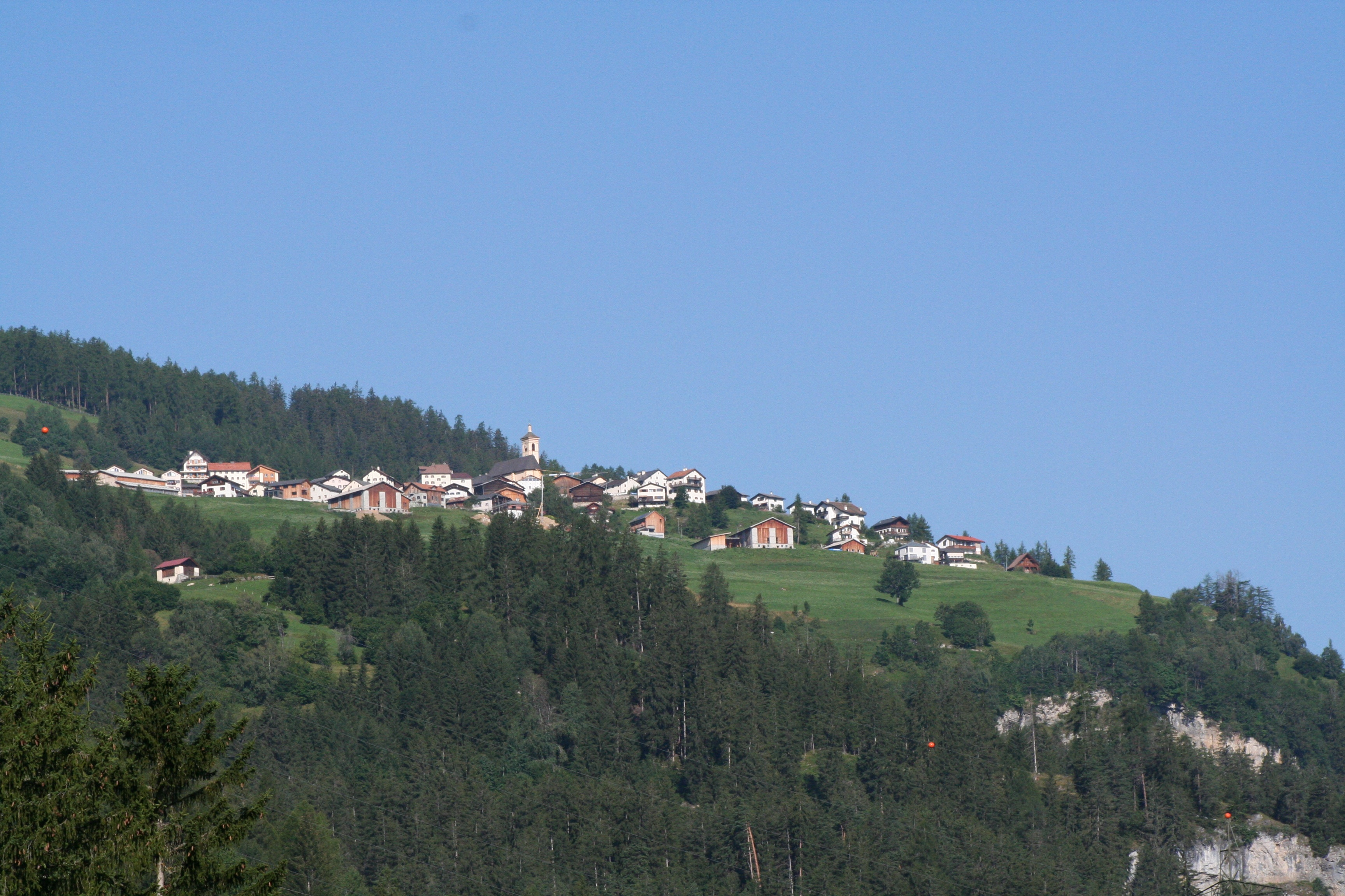 Stierva GR, von Tiefencastel aus gesehen